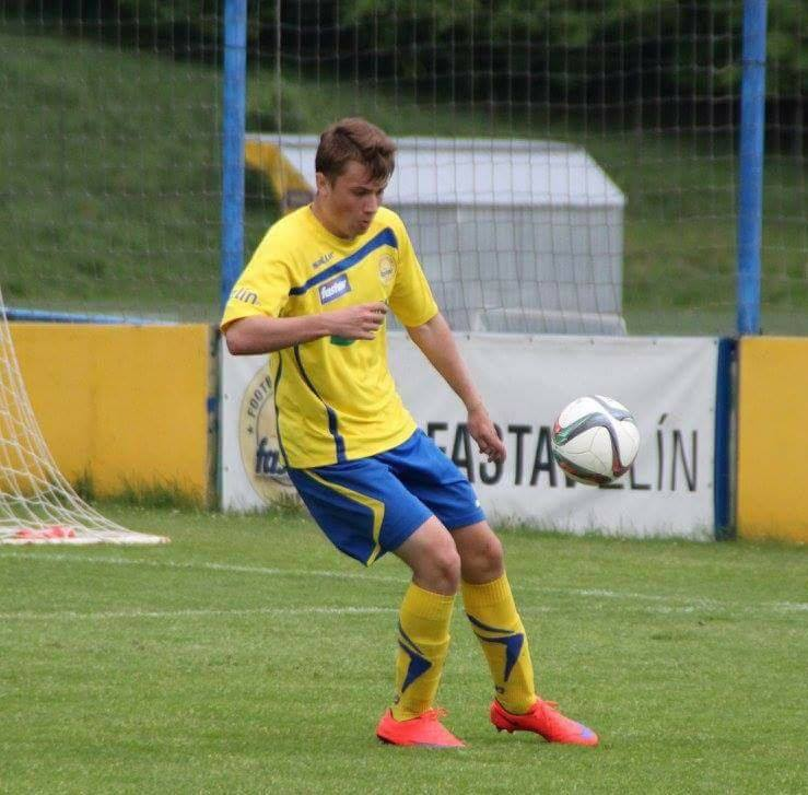 Patrik Červenka